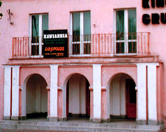 Tarnogród, Poland Arches at town square / Podcienia w rynku